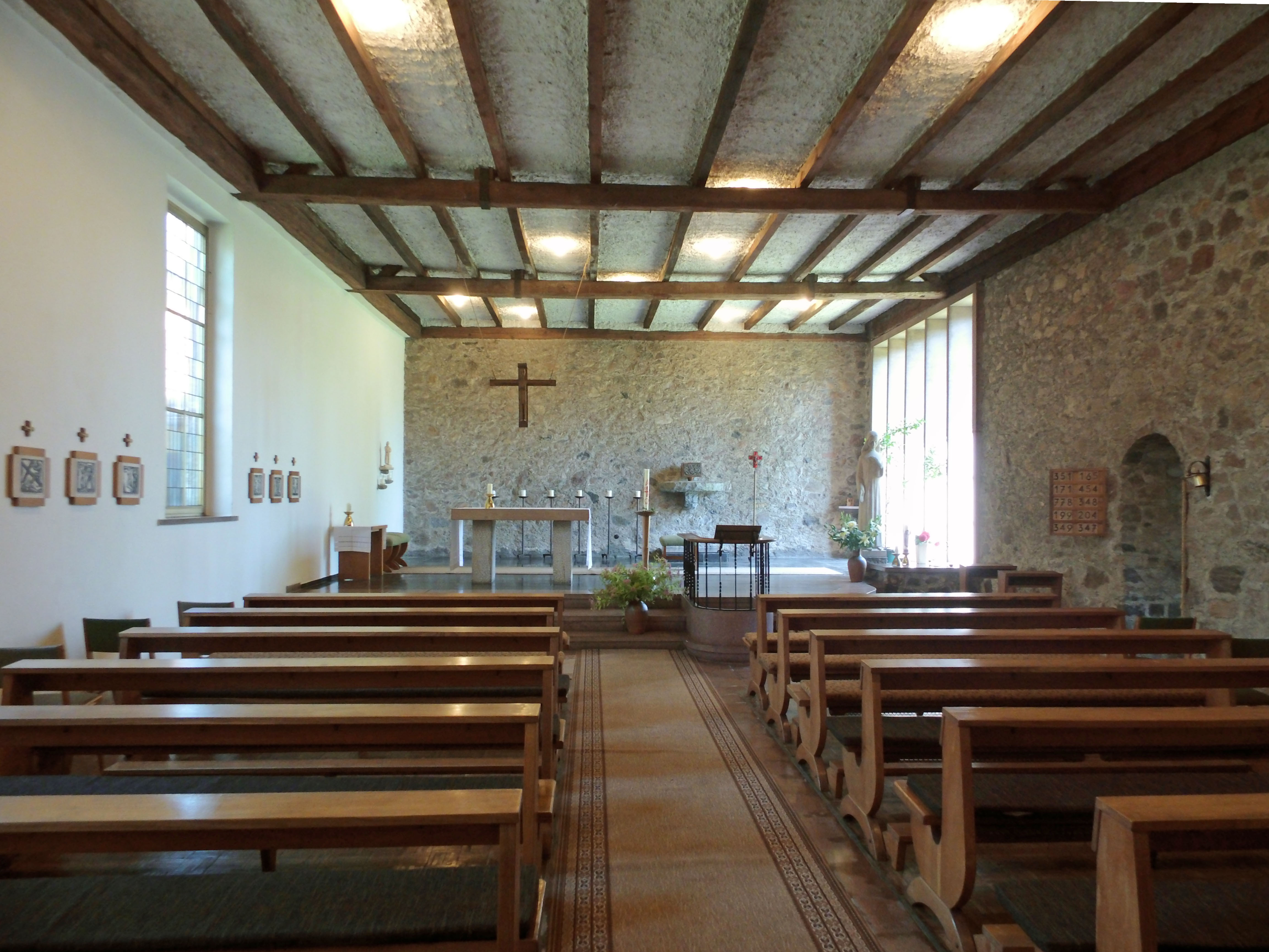 Katholische Kirche St. Nikolaus von der Flüe in Colbitz (Sachsen-Anhalt)